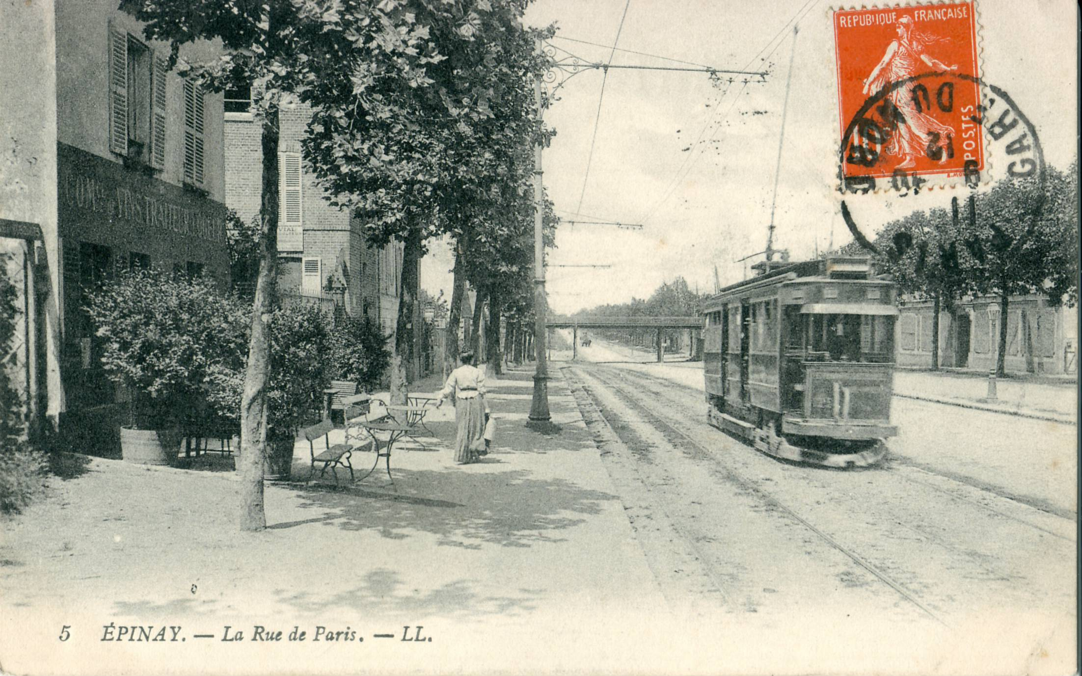 Carte postale ancienne éditée par LL N°5 EPINAY - La rue de Paris Motrice du tramway de la ligne Enghien-Trinité (Cie Nord-Parisien)